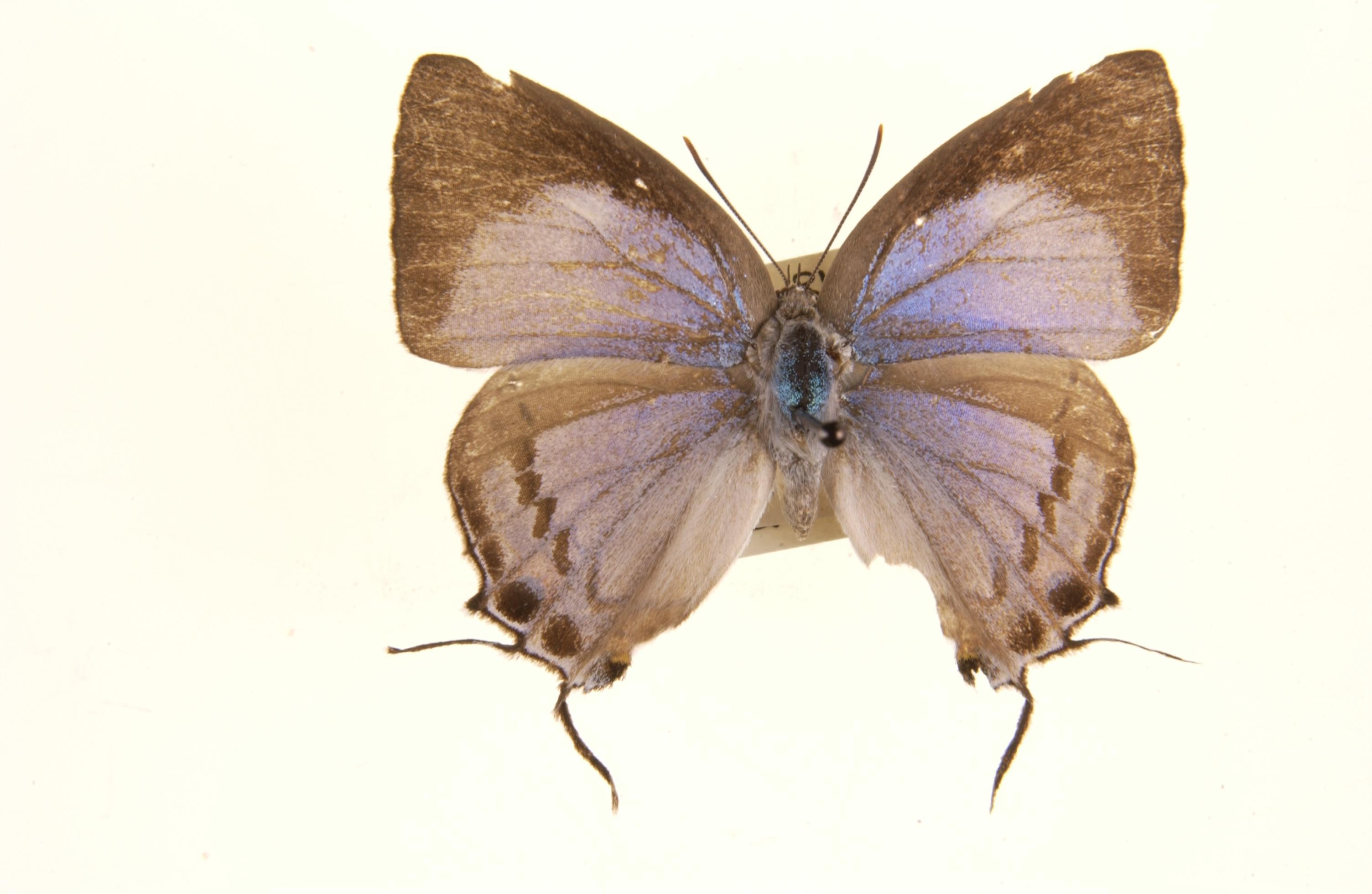 Tajuria cippus Female